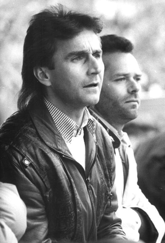 ADN-Hiekel-7.4.90-Dresden: Fußball-Oberliga Zwei aus einer früher prominenten Mittelfeldreihe bilden jetzt das Trainer-Gespann bei Dynamo Dresden - Reinhard Häfner (l) und Hartmut Schade. Ihr Einstand war kein voller Erfolg, denn am 20. Spieltag mußte sich der Meister zu Hause gegen FC Hansa Rostock mit einer Punkteteilung zufriedengeben.